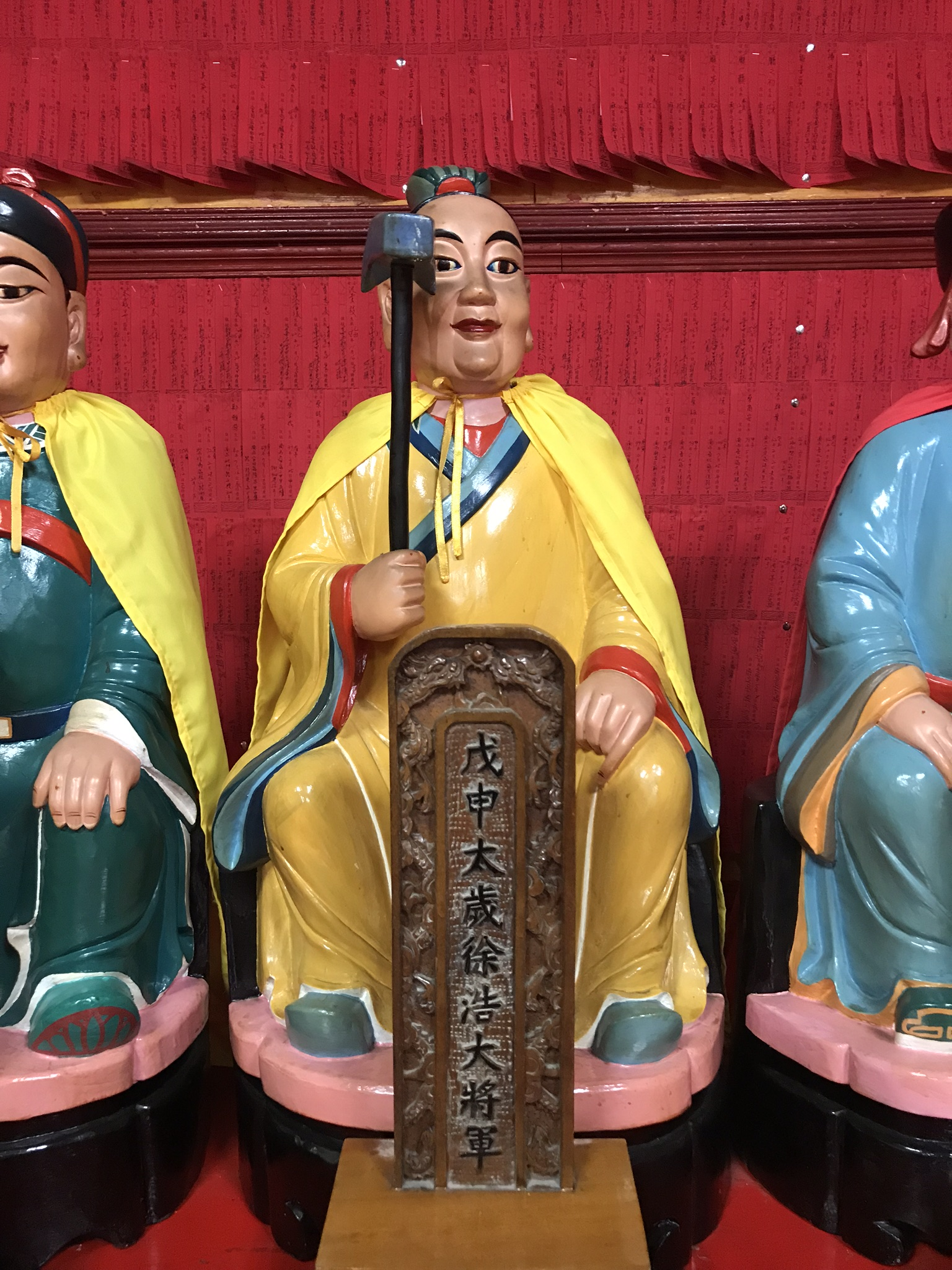 戊申太歲徐浩大將軍神像